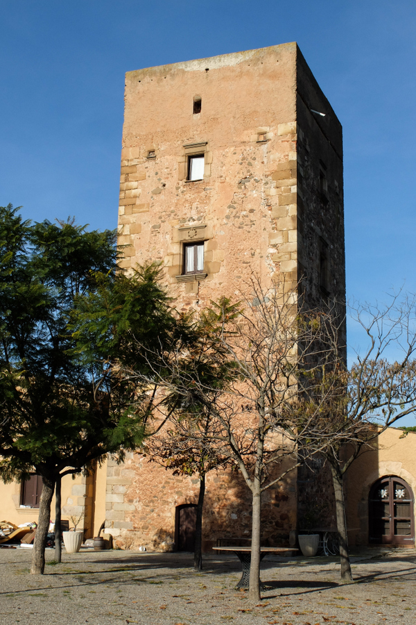 Castell de Castellarnau, a la comarca del Vallès Occidental, Catalunya